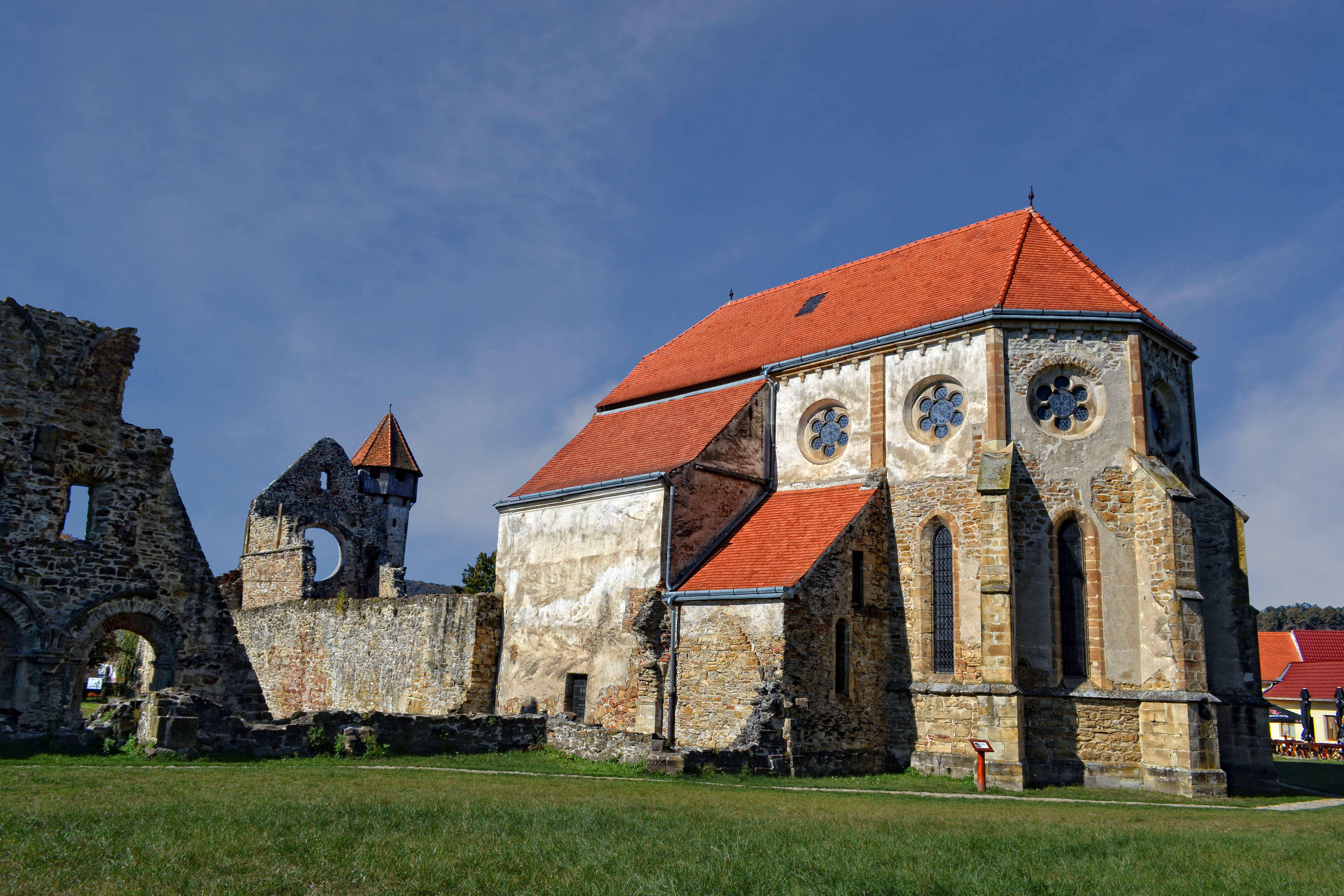 Mănăstirea Cârța